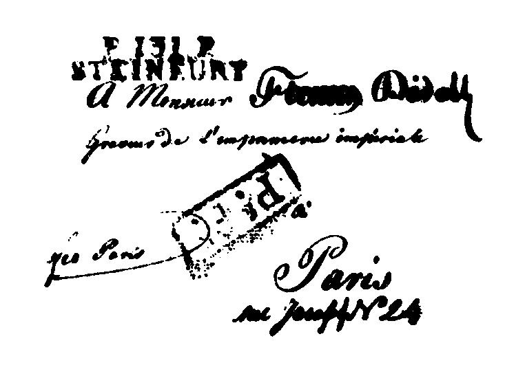 Seltenen Brief mit vorausbezahlten Porto